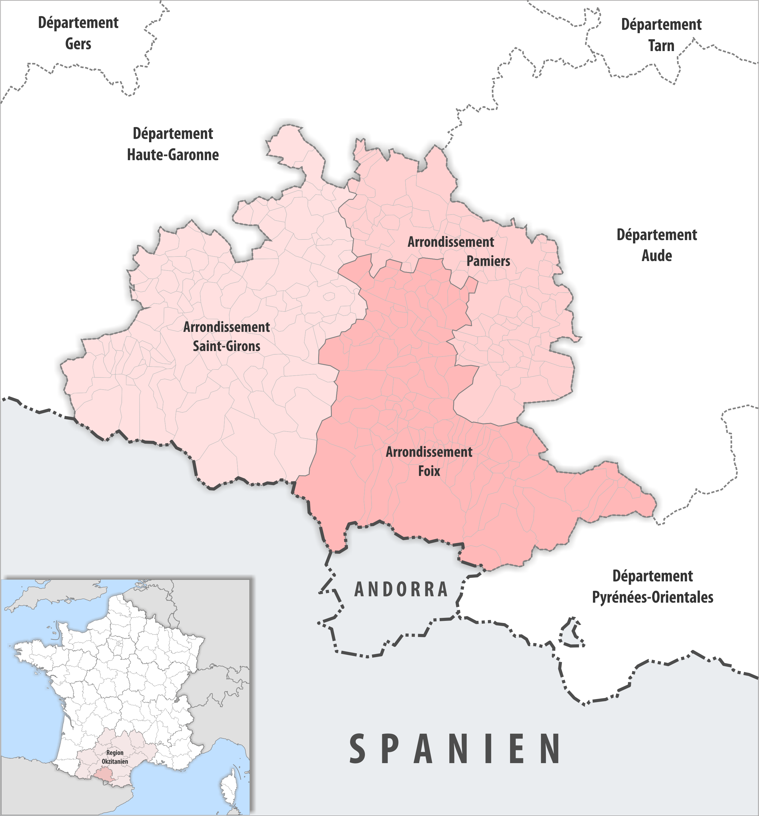 Gemeinden und Arrondissemente im Departement Ariège